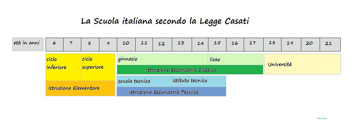 La Scuola italiana secondo l'ordinamento dettato dalla Legge Casati